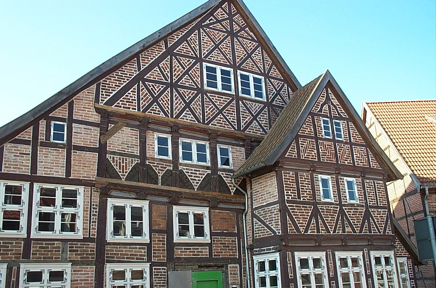 Deutsches Haus in Rehna Autor: Volker Jödicke